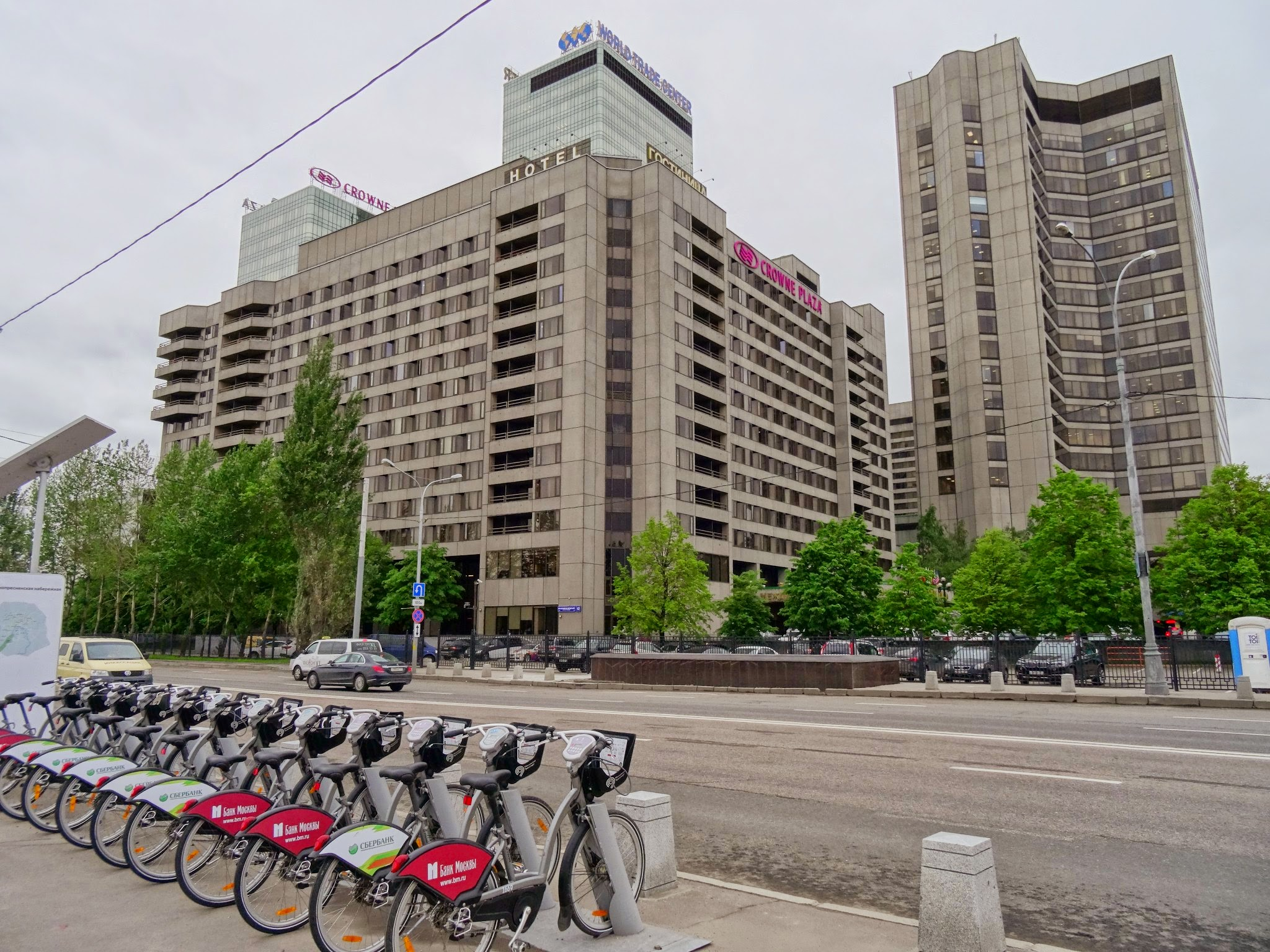 Москва